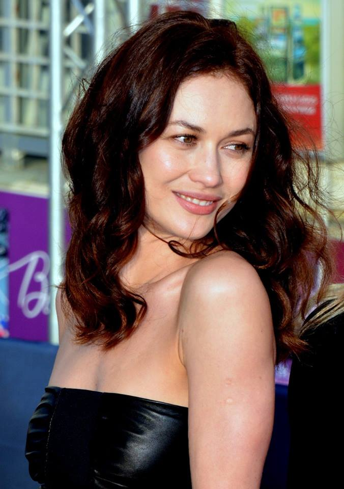 Olga Kurylenko au festival de Cabourg